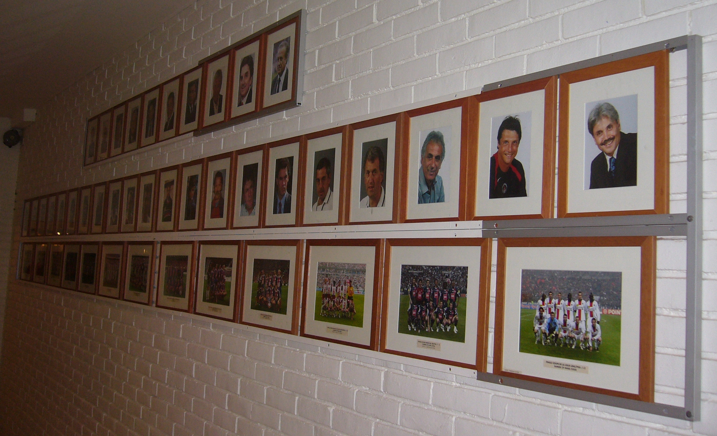 Couloirs menant aux vestiaires Visite du Parc des Princes lors des Journées du Patrimoine 2008